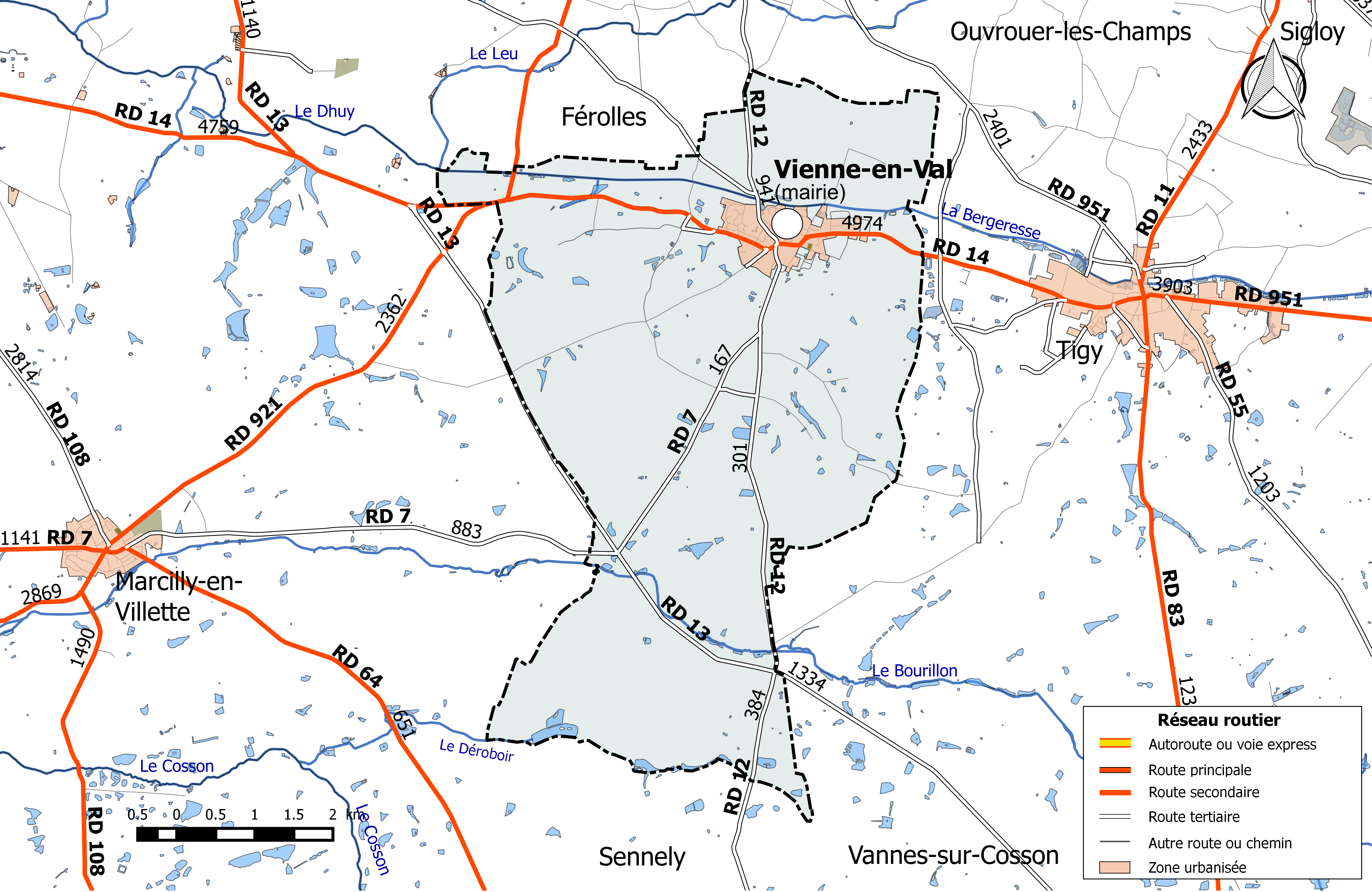 Carte du réseau routier de la commune de Vienne-en-Val.